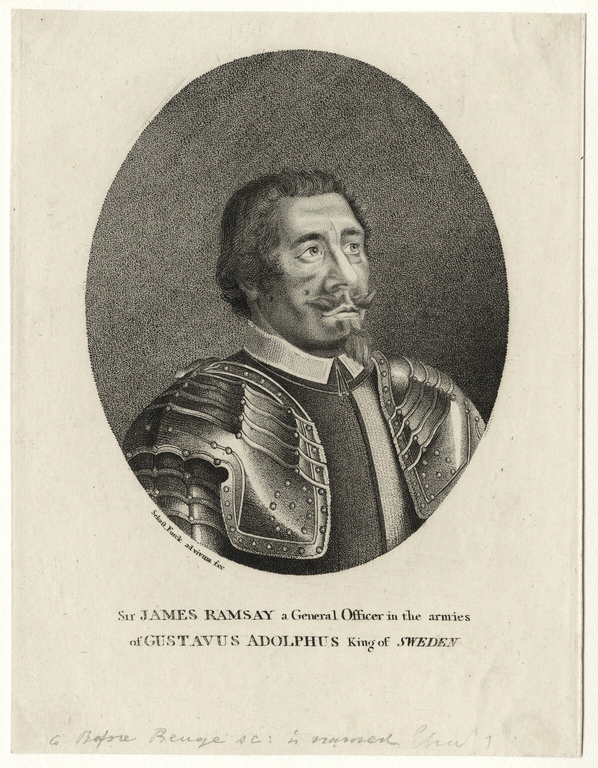 Line, stipple engraving